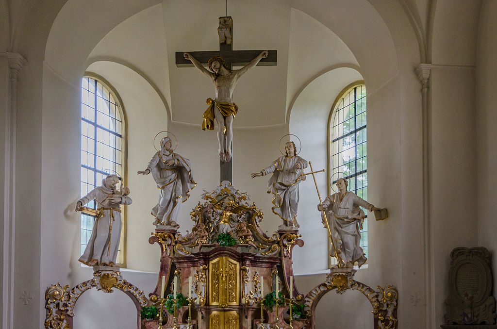 kath. Kirche in Euerbach Hochaltar